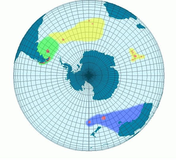 Carte représentant les zone de reproduction et d'habitation du manchot Gorfou Sauteur. En vert, les zones ou le gorfou sauteur 'chrysocome' vie. En jaune, les zones ou le gorfou sauteur 'moseleyi' vie. En bleu, les zones ou le gorfou sauteur 'filholi' vie. En rouge, les zones ou le gorfou sauteur se reproduit. Créer Par BRUCHET Sébastien et sous license GFDL. Status of Indian Ocean population needs verification - might be filholi too. Dysmorodrepanis 22:56, 27 May 2008 (UTC) (Utilisation de File:MapS.png pour la création)